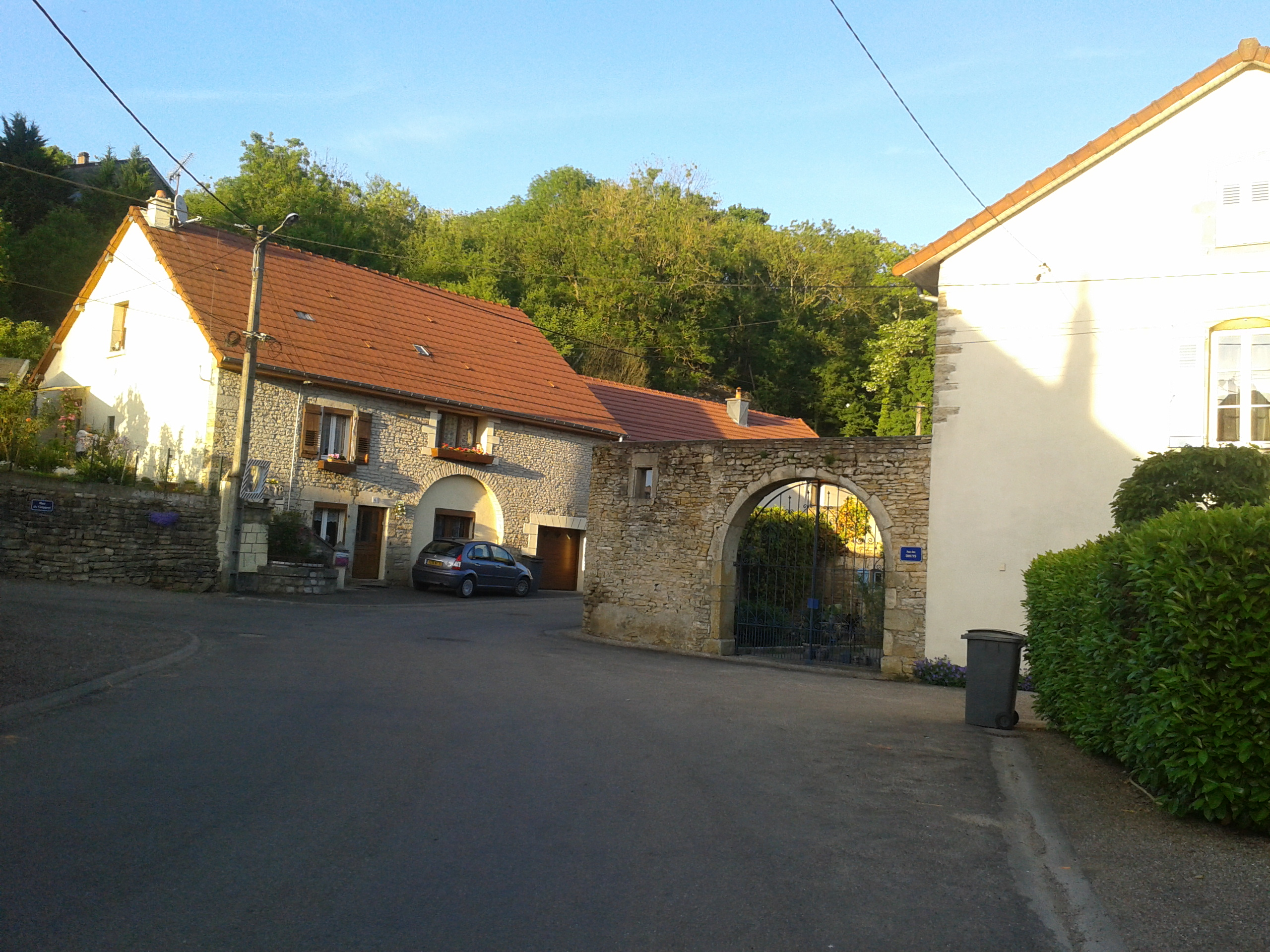 Des habitations à Coulevon